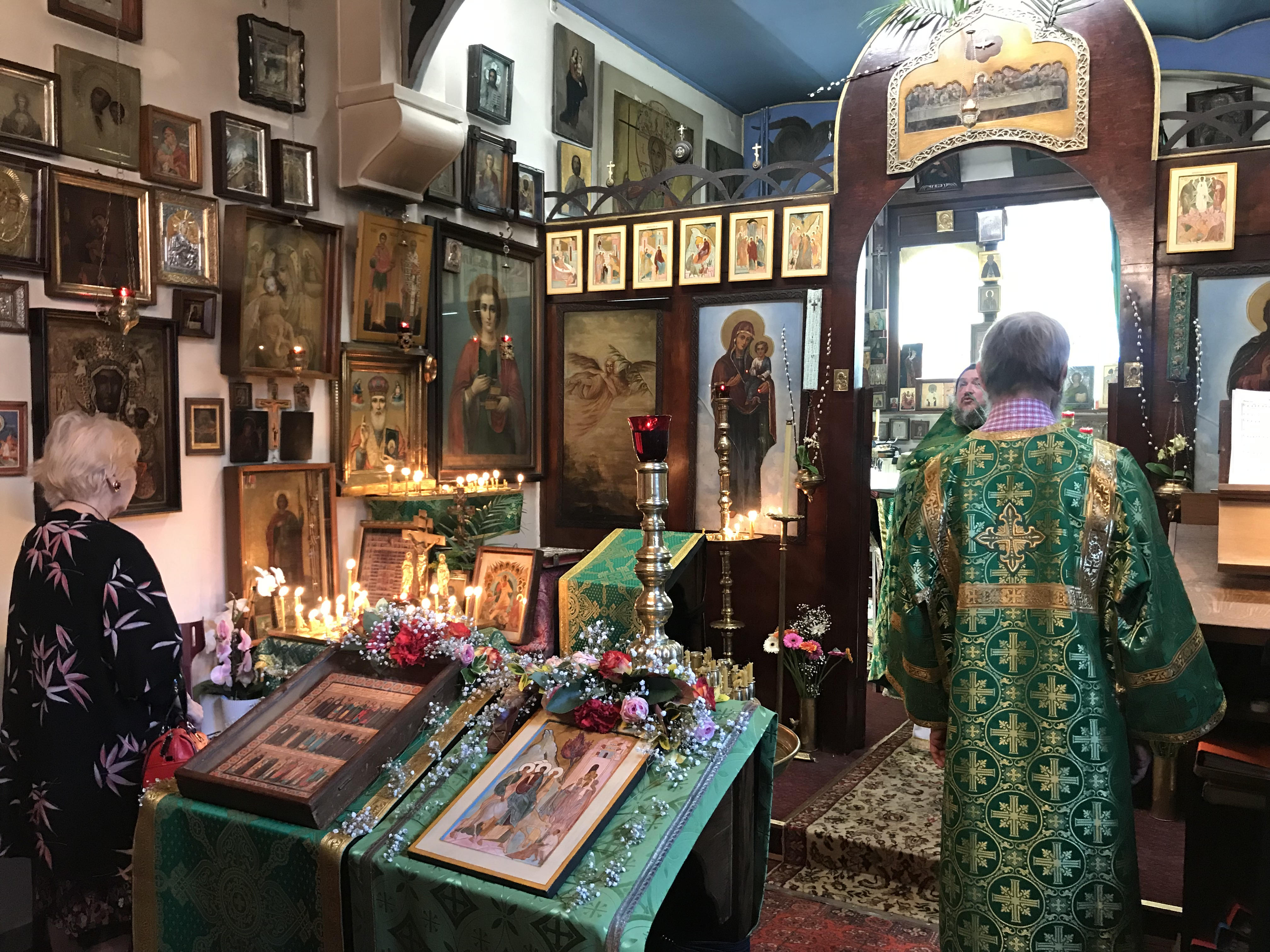 Xрам Св. Целителя Пантелеймона и Св.Николая Чудотворца в Брюсселе особенно бережно украшается прихожанами к празднованиям Рождество Христова и Пасхи.